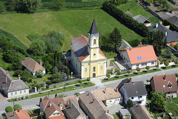 Légi fotó Lövőről